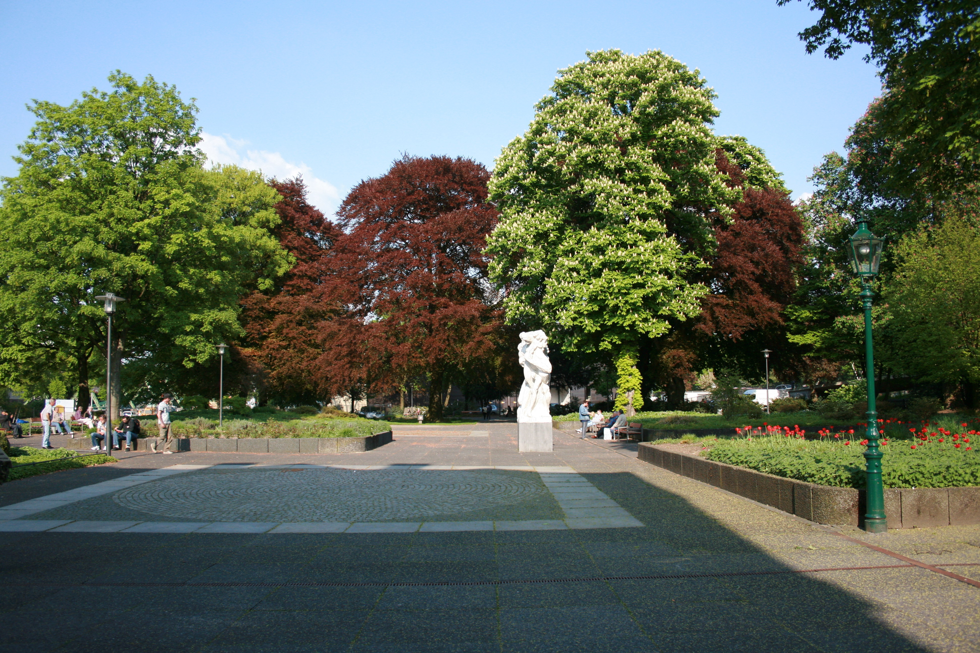 Engelsgarten in Wuppertal